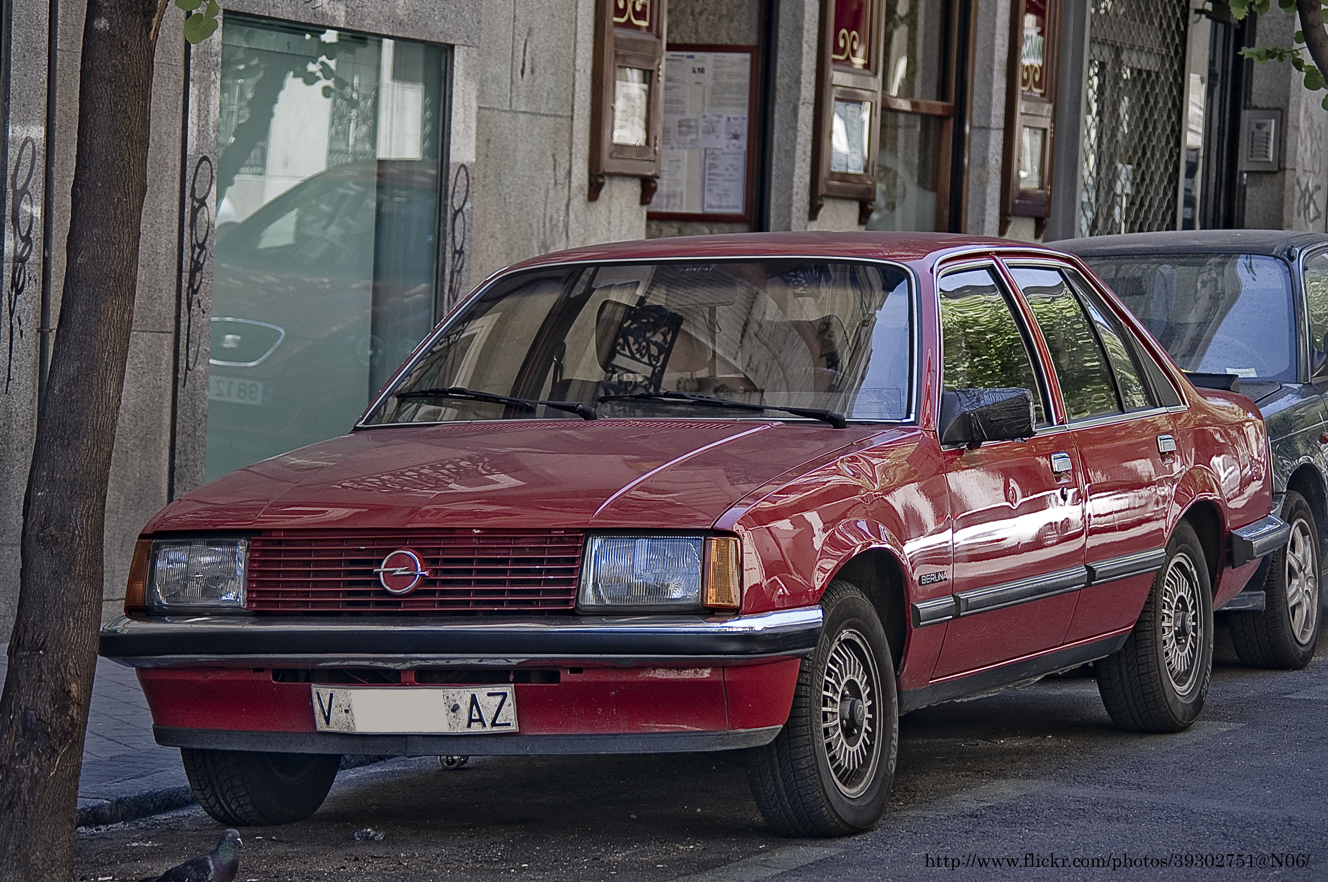 1982 Opel Rekord Berlina [E]